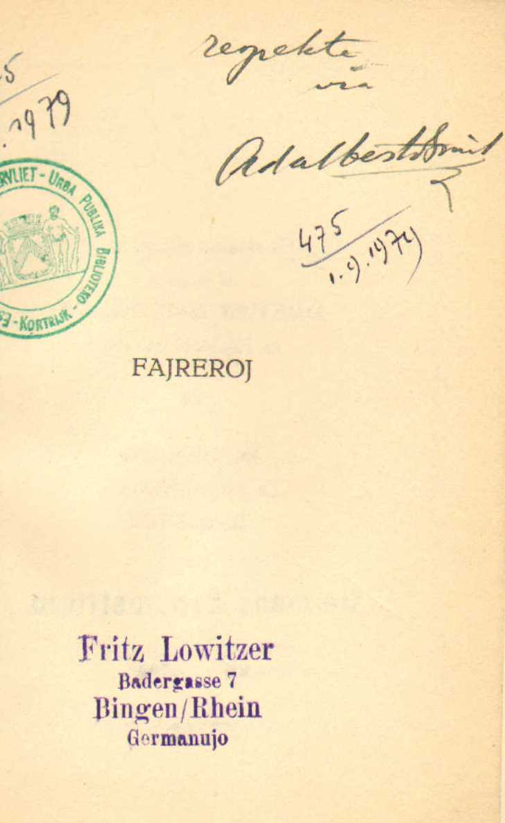 Subskribo de Adalbertus Smit, 1927